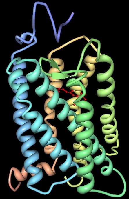 Structure cristallographique 3D de la Rhodopsine bovine (#1F88).